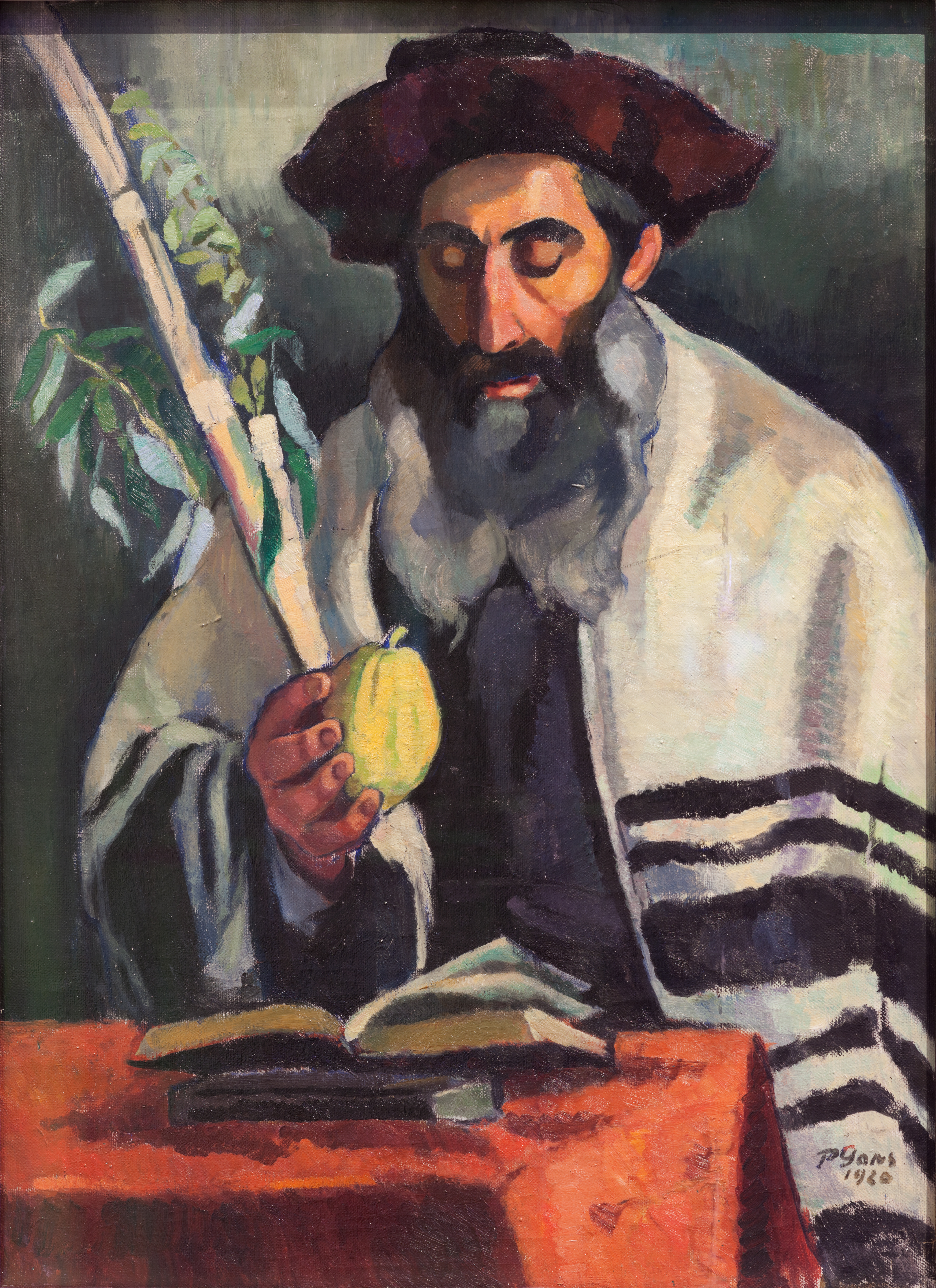 Gemälde des Laubhüttenfestes. Deutlich zu erkennen sind der Etrog, eine Zitrusfrucht, sowie der Lulav, der Feststrauß.